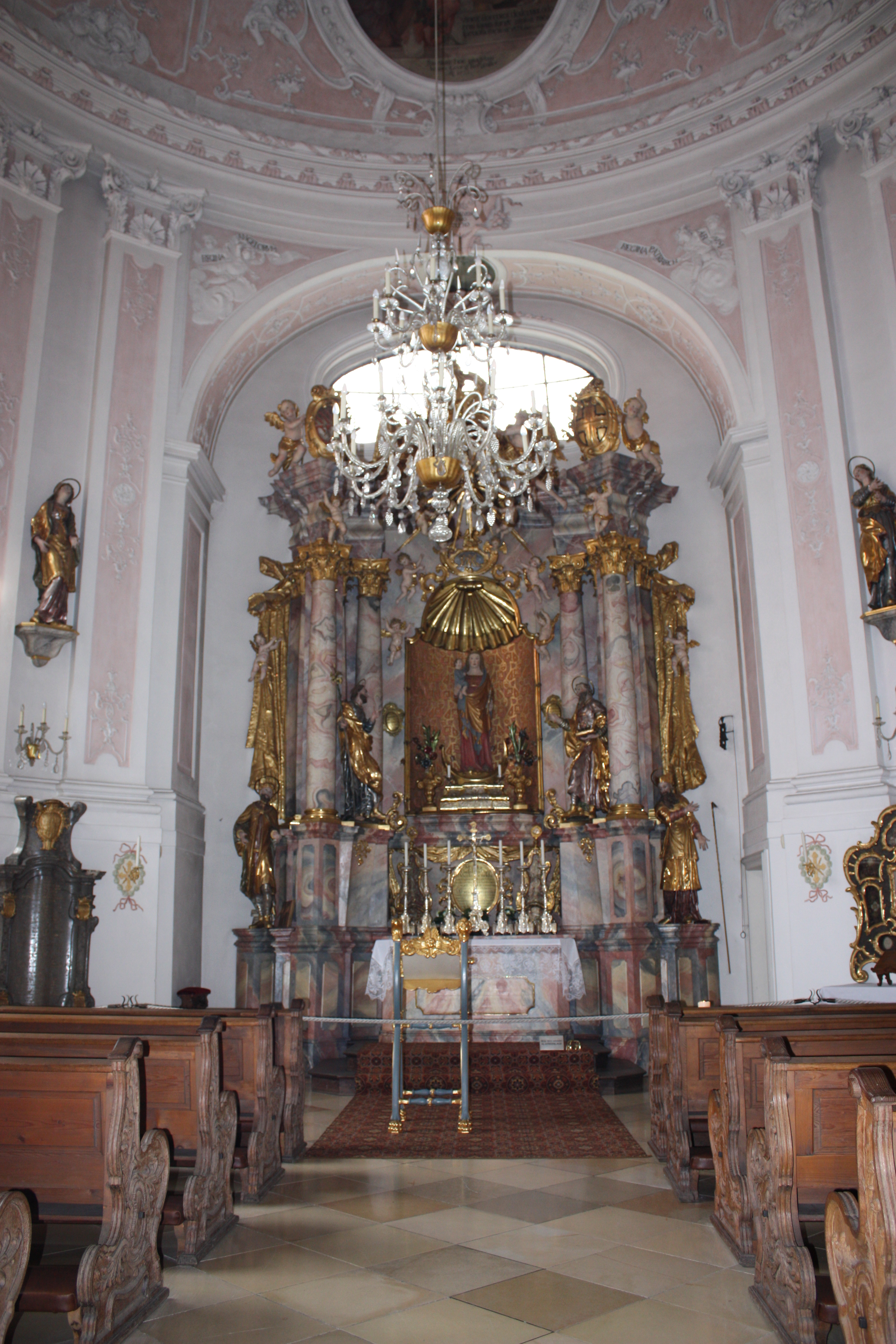 Dom Unserer Lieben Frau, Augsburg